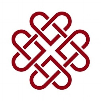 amanaamanaアマナアマナのシンボルロゴ